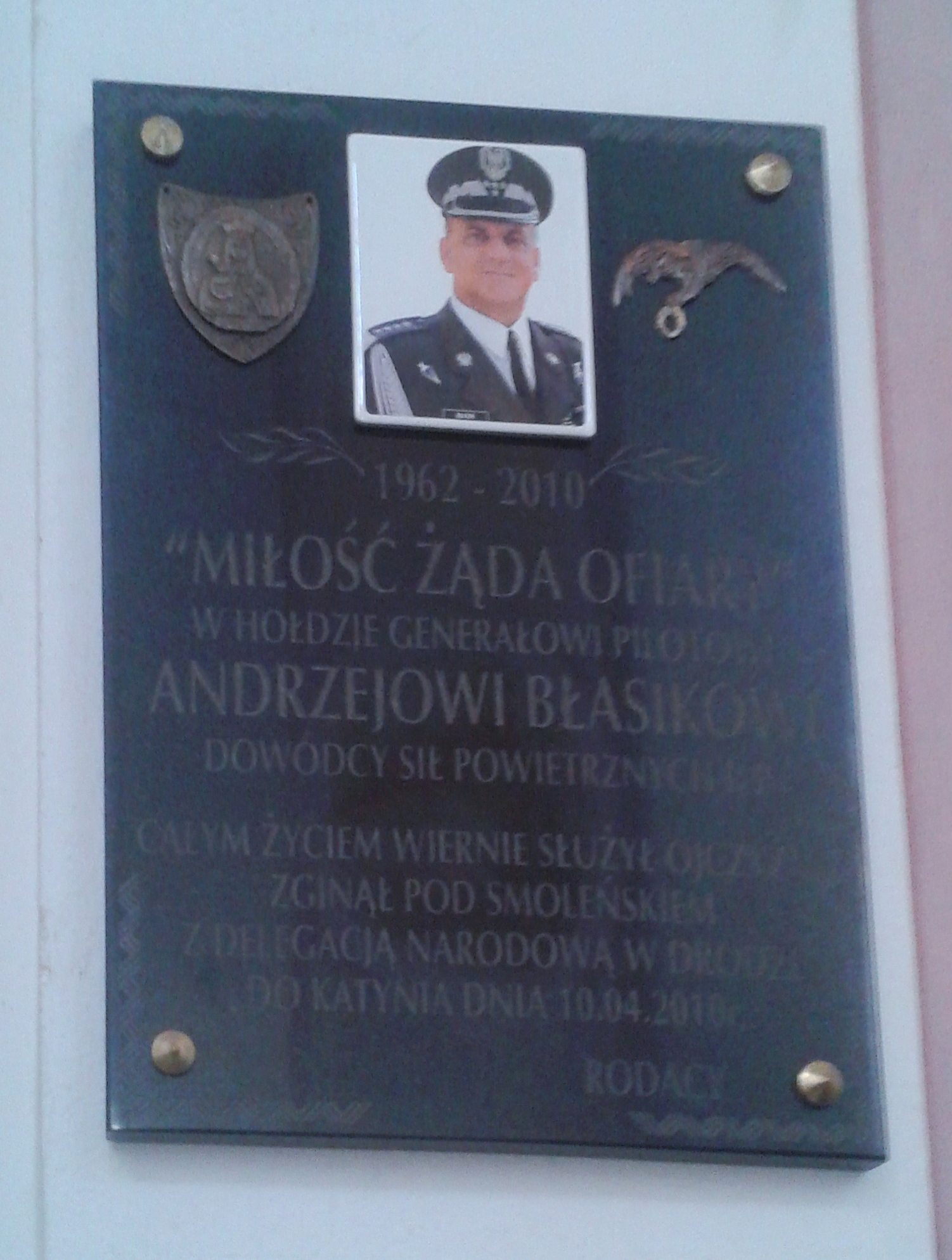 Tablica pamięci gen. Andrzeja Błasika w kościele w Leśnej